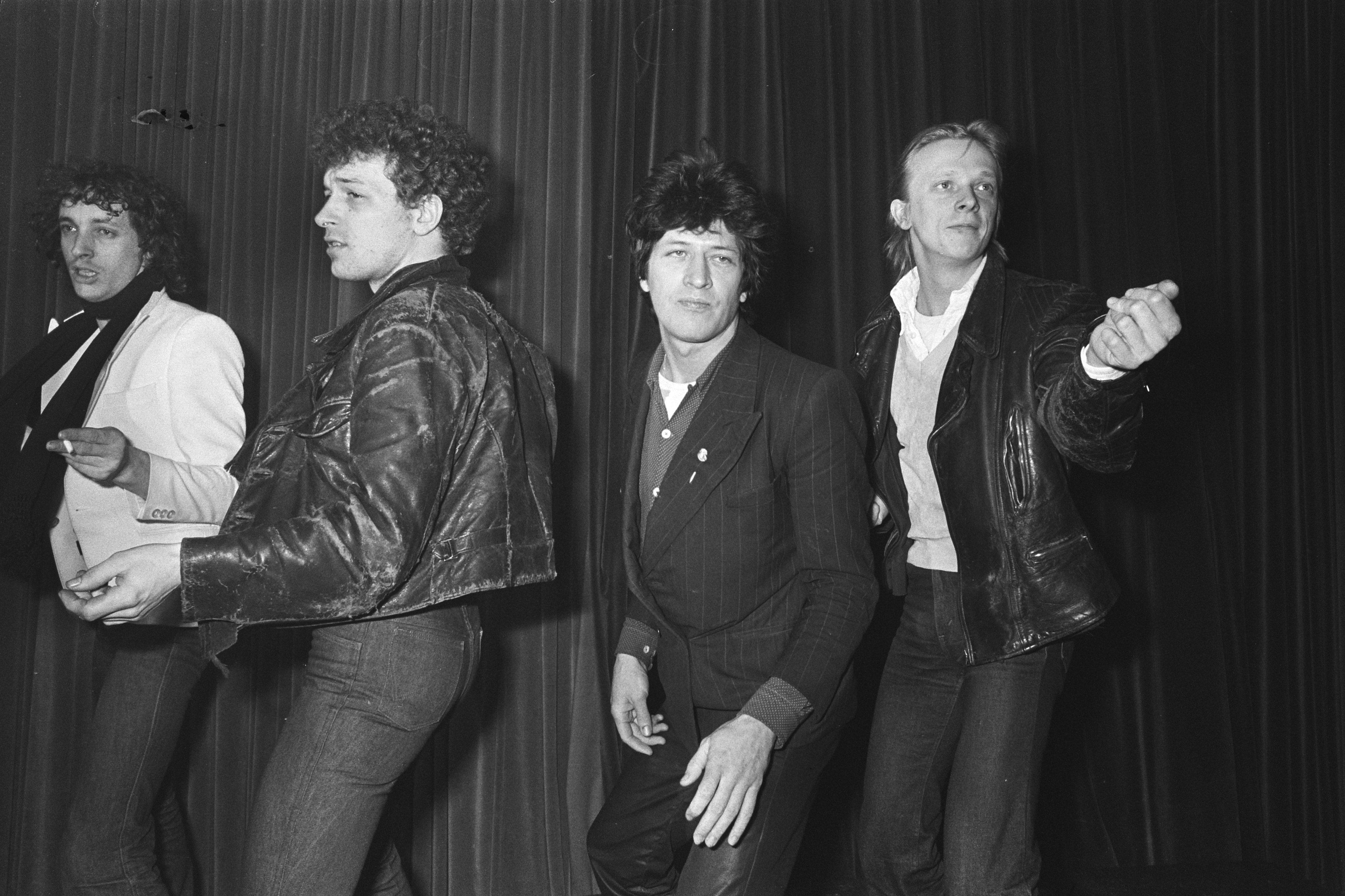 Uitreiking zilveren harpen aan (...) Herman Brood and his Wild Romance. Bezetting: Ani Meerman (drums), Freddie Cavalli (bas) en Dany Lademacher (gitarist).